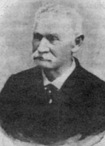 Breznyik János királyi tanácsos, a honvédhadnagy, akadémiai tanár, a selmeci evangélikus líceum igazgatója.